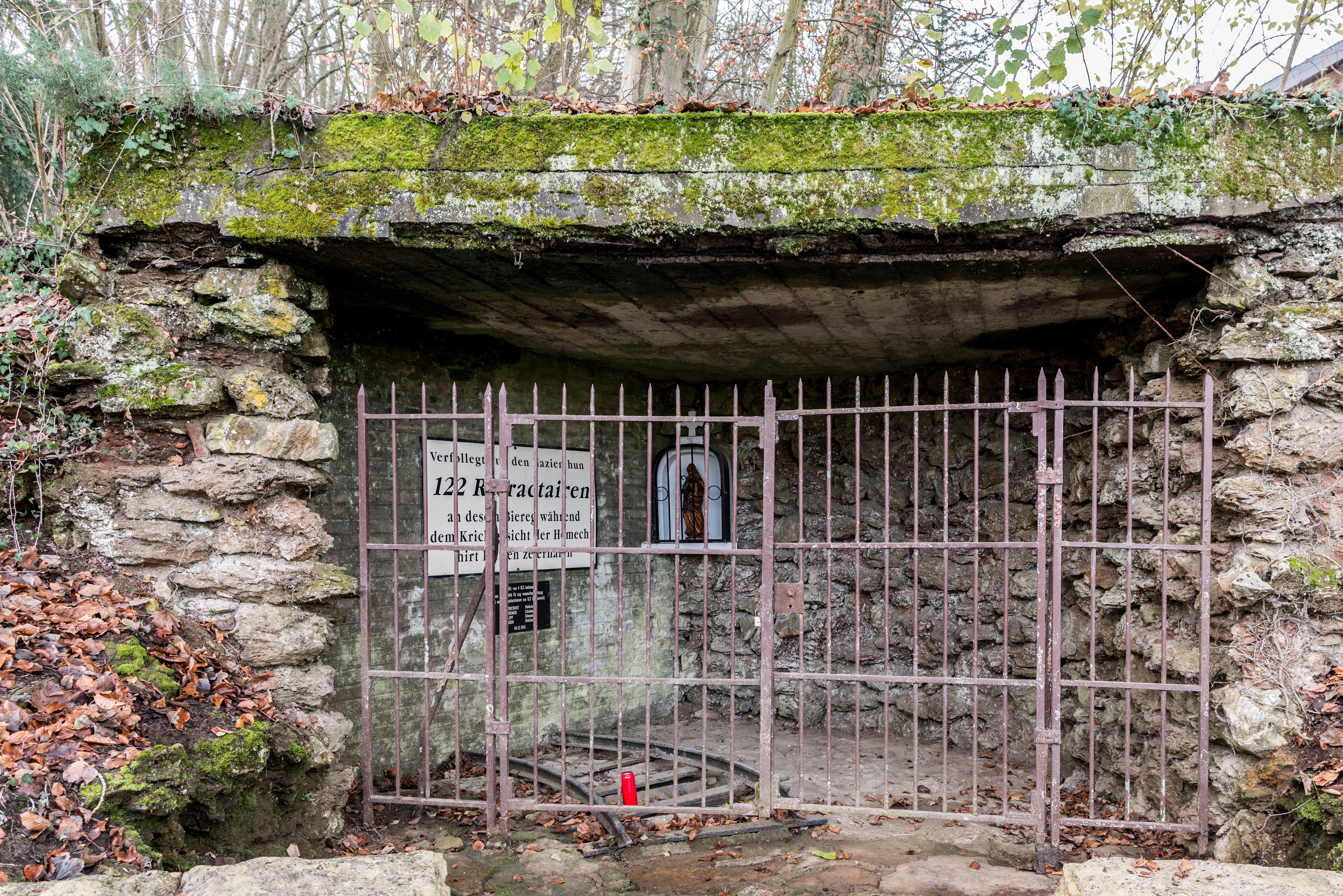 D'«Monument Honsbësch», hanner dem Monument aux Morts an der Avenue de la Liberté zu Nidderkuer.Hei gëtt un 122 Refractairen erënnert déi am Bunker Hondsbësch passéiert sinn. Honsbësch oder Hondsbësch? Heiriwwer schéngt Onkloerheet ze herrschen. Op de Websäite fënnt ee béid, oft déi zwéin um nämlechte Site. Um Kadaster gëtt de Bësch ënner Honsbësch gefouert.